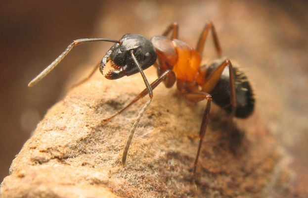 Cette autre magnifique photo a été prise par également par un ami, Radiss, qui, comme moi élève des fourmis. La photo a été prise dans une aire de chasse artificielle le 2 septembre 2004. Il s'agit d'une ouvrière Fourmi de l'espèce Camponotus herculaenus. Cette espèce est la plus grande en Europe centrale, la reine peut atteindre les 2 centimètres. Les ouvrières mesurent de 1,4 cm à 1,7 cm (pour les majors) et leur céphalothorax est rouge orangé. Elles se rencontrent assez souvent dans de vieux arbres morts, elles ont l'habitude de creuser leurs nids en suivant les cercles concentriques du cœur de l'arbre. Leur habitudes alimentaires sont omnivores, mais en principal elles se nourrissent d'insectes. En captivité elles ne dédaignent pas un peu de miellée (eau + miel à 50x50).